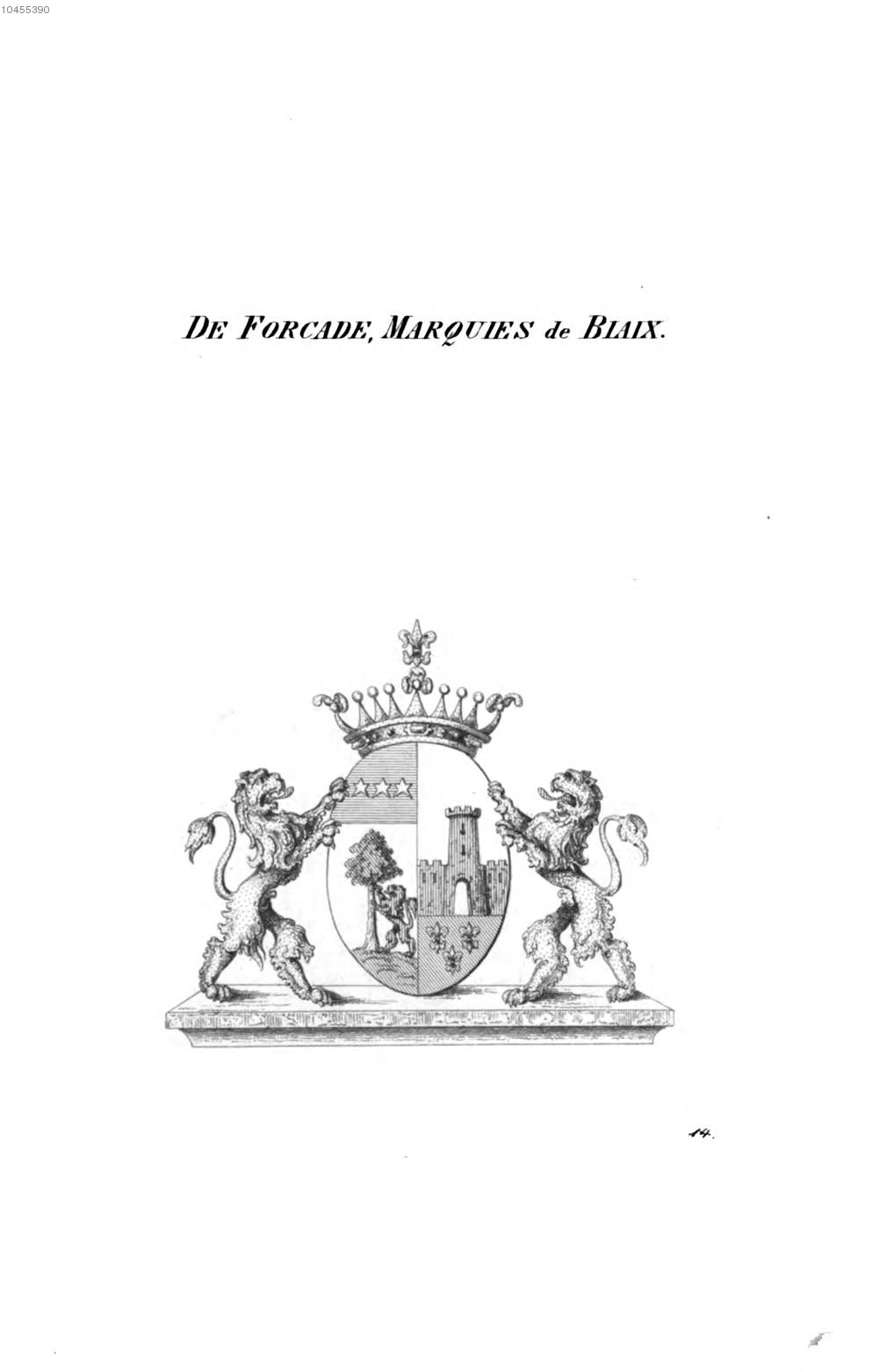 Wappen Forcade Mq de Biaix - Tyroff HA.jpg